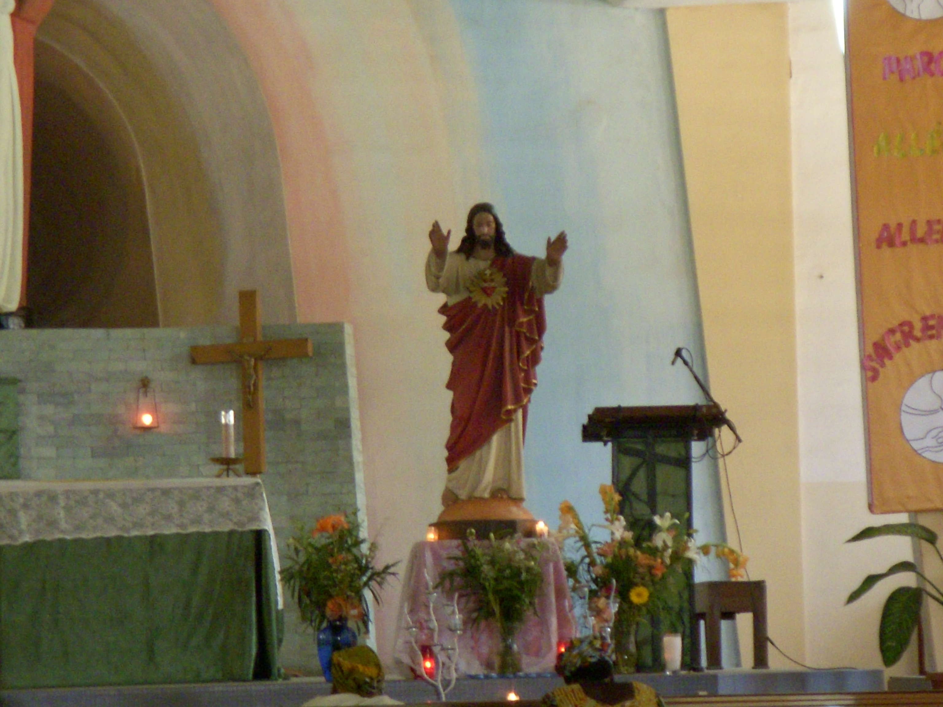 Eglise du Sacré Coeur à Dakar, Sénégal